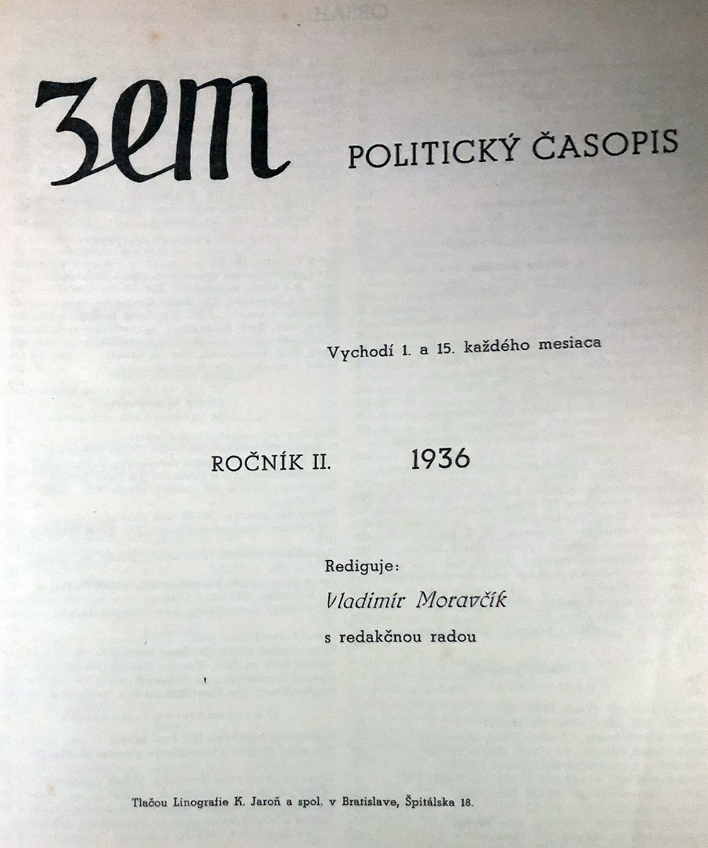 1936, II. ročník časopisu Zem